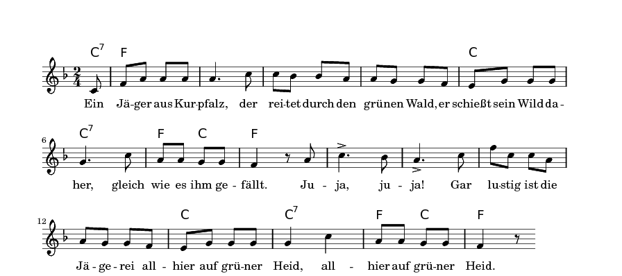 folk song